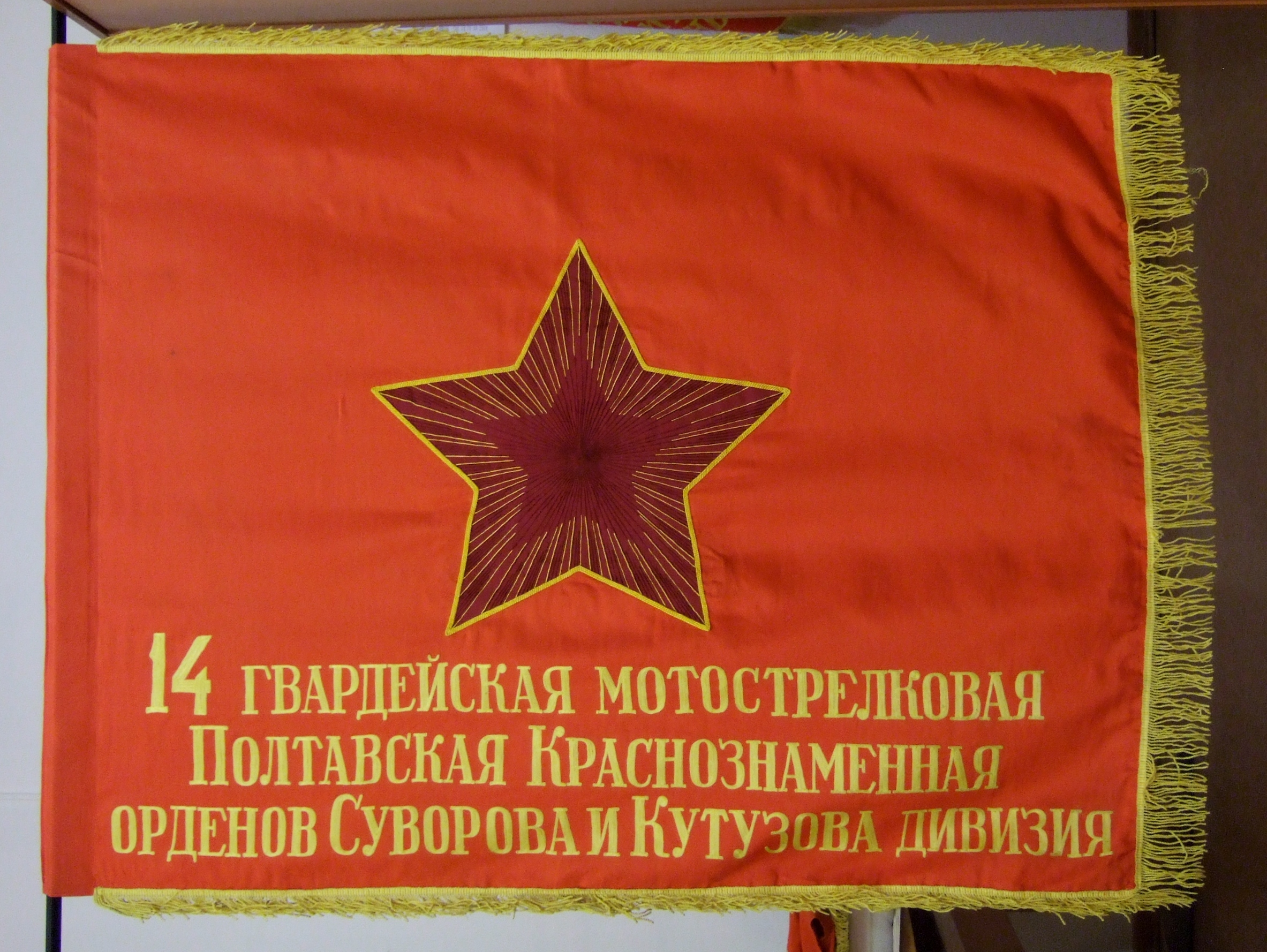 Боевое Знамя 14 гвардейской мотострелковой (32 гвардейской танковой) дивизии Советской Армии, фото сделано в Знамённом Фонде Центрального музея ВС